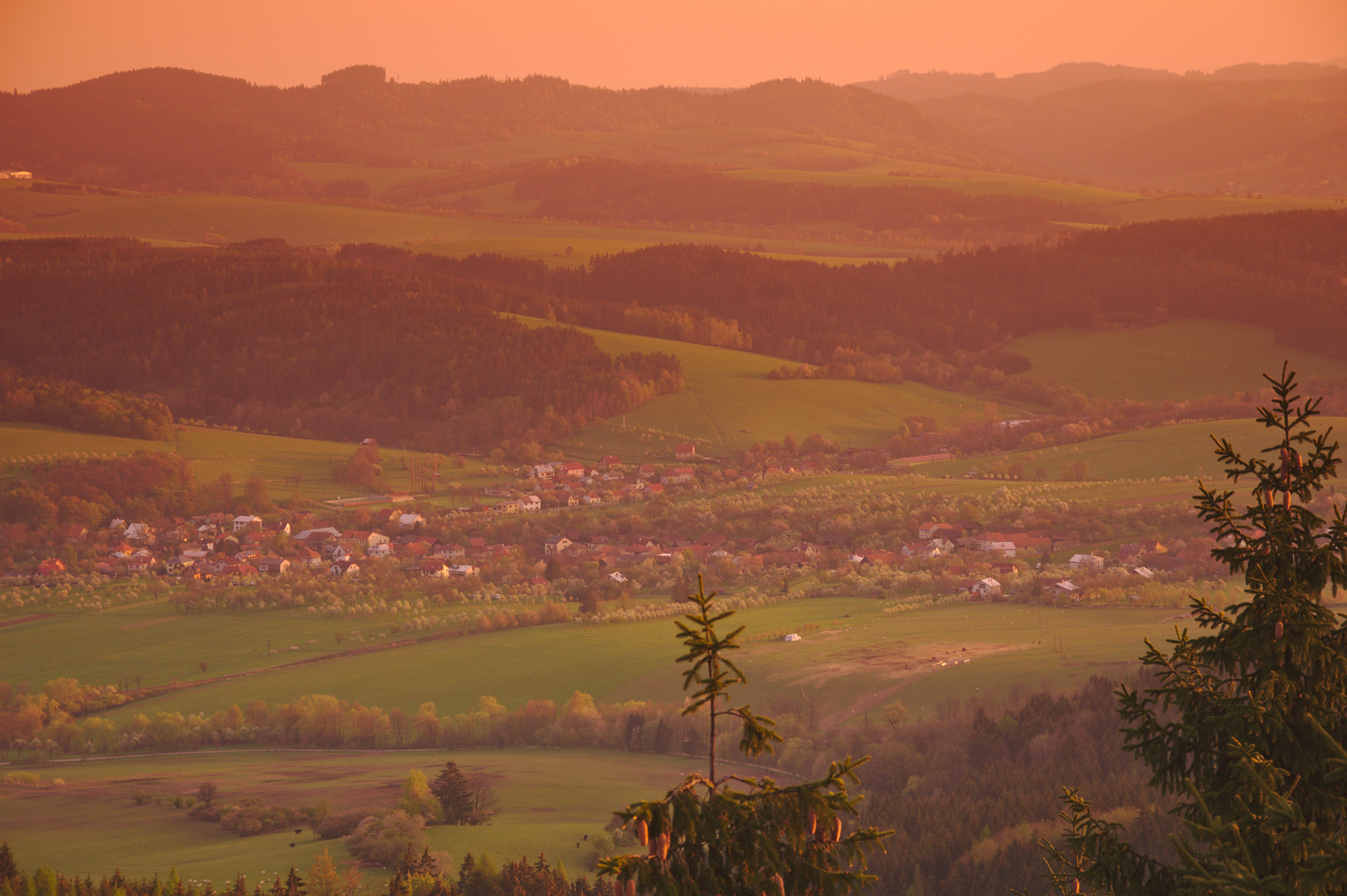 Valašské Příkazy při východu slunce z rozhledny Královec, okres Zlín